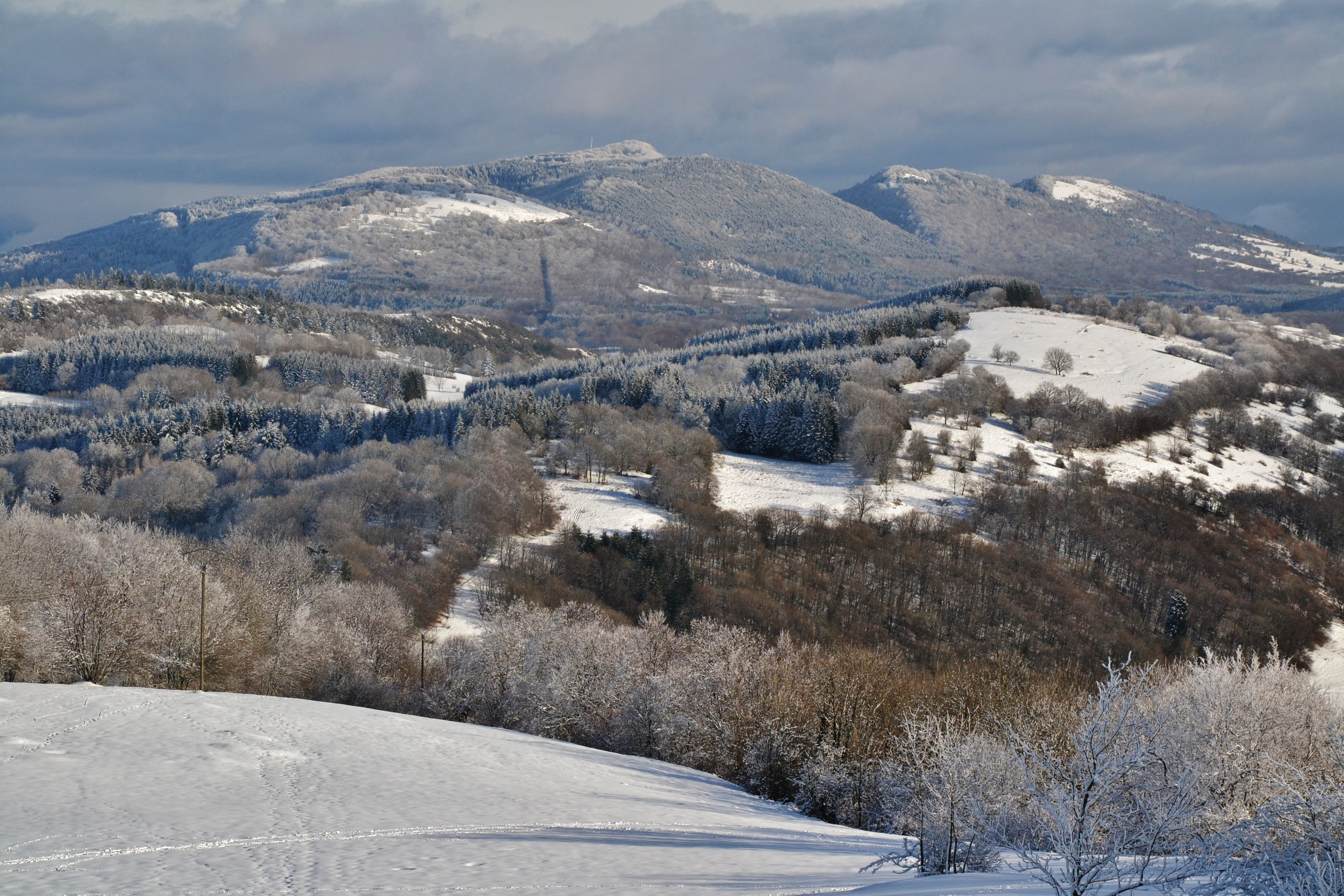 Le Mollard de Don (1 217 m) depuis le calvaire de Portes.